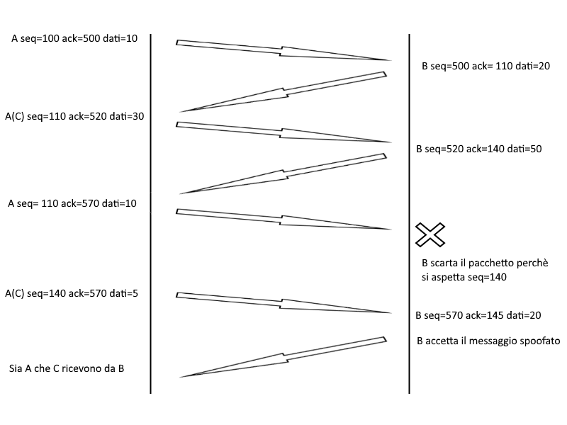 Desincronizzazione tra A e B mediante un attaccante C